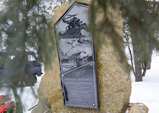 Открытие мемориальной плиты Героя Российской Федерации подполковника Олега Пешкова в селе Косиха Алтайского края